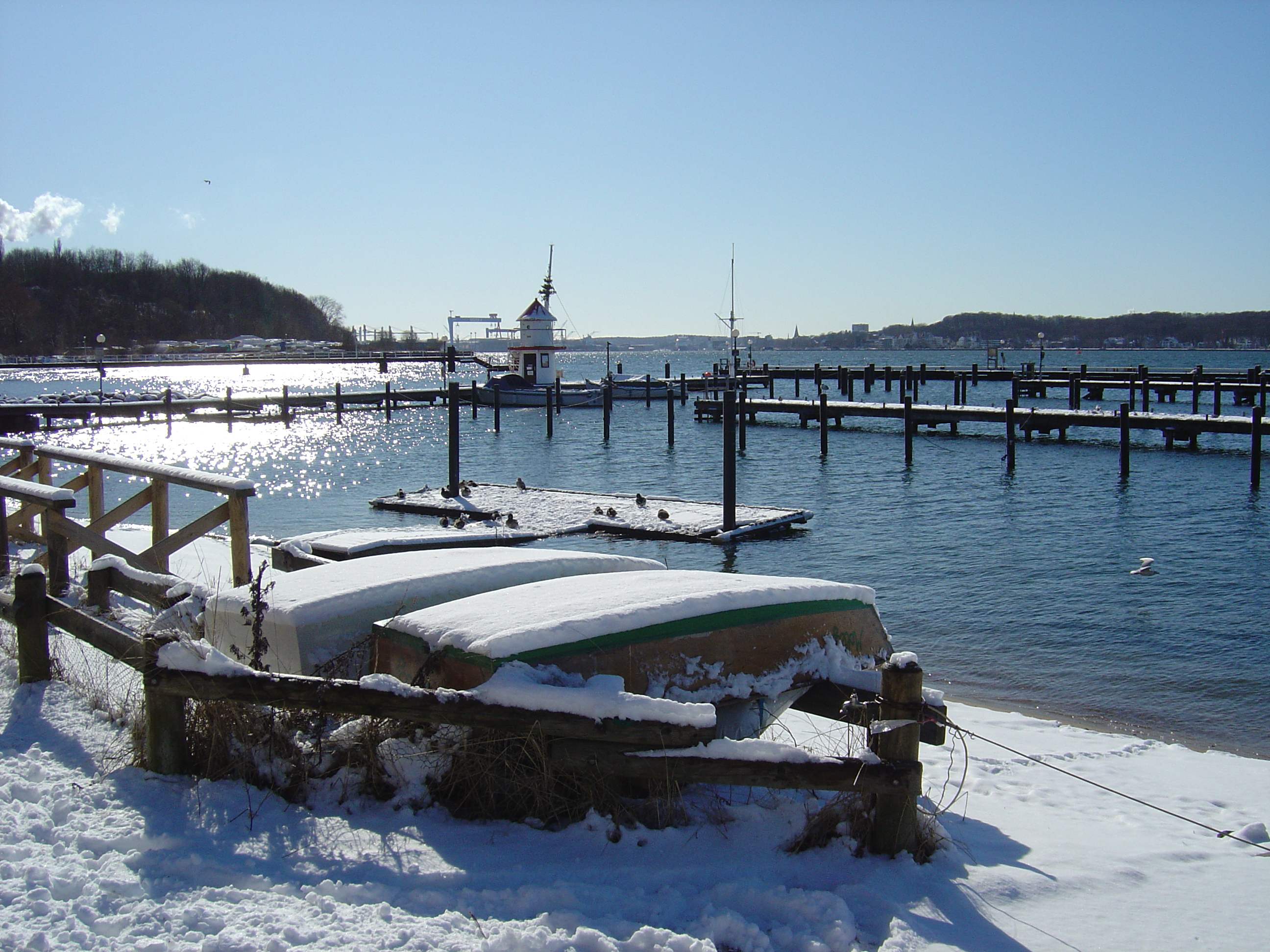 Im Hintergrund Howaldswerke (HDW) und Kiel City